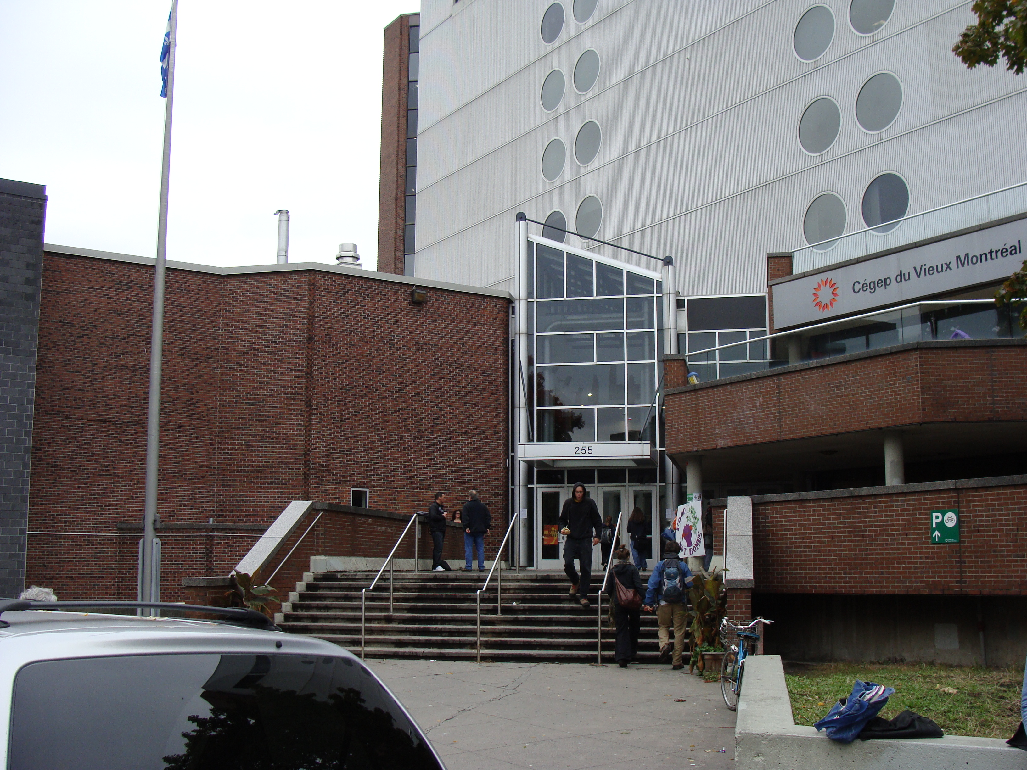 Entrée du Cégep du Vieux Montréal sur la rue Ontario.